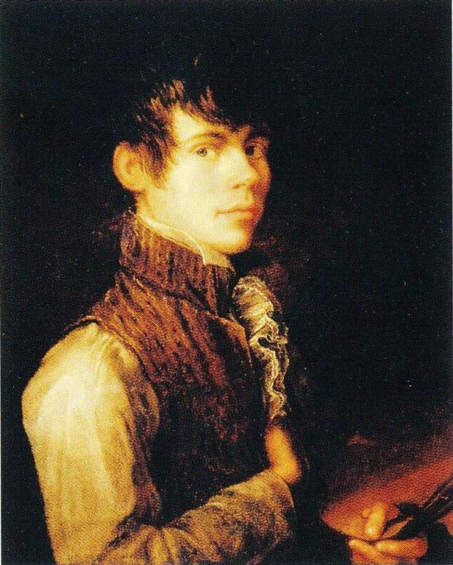 Taiteilija Alexander Lauréus, omakuva.